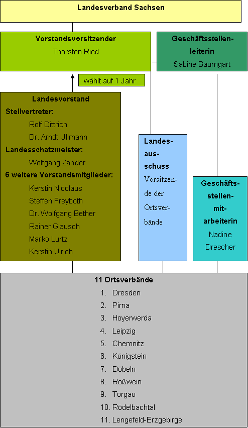 Organigramm BDS Sachsen